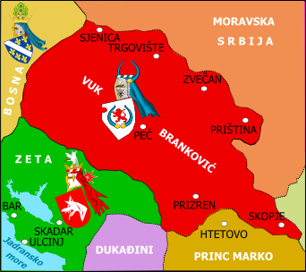 Posjedi Vuka Brankovića.